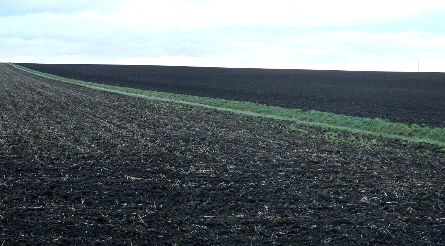 Schwarzerde bei Asel